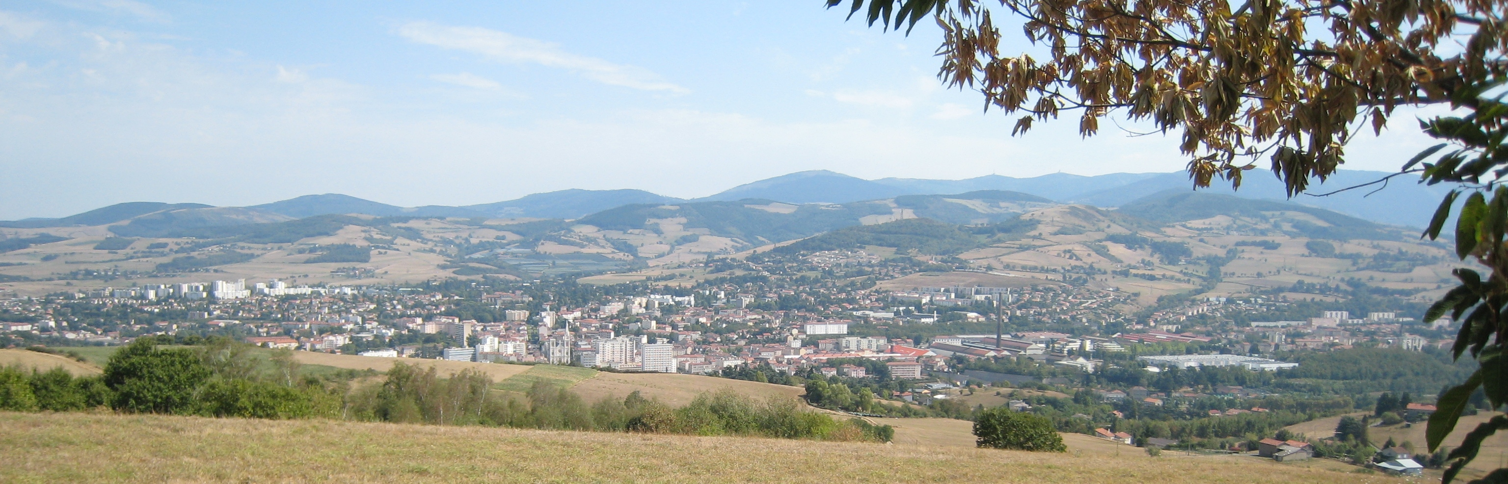 Paysage de Saint Chamond